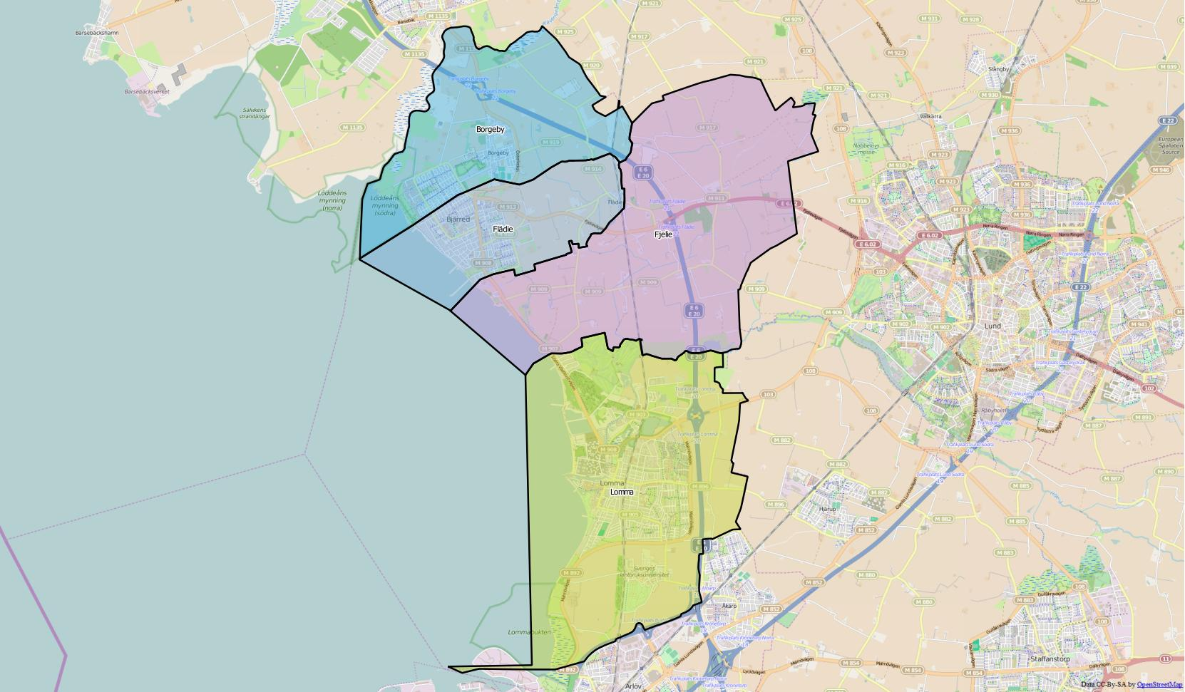 Distriktsindelningen i kommunen.